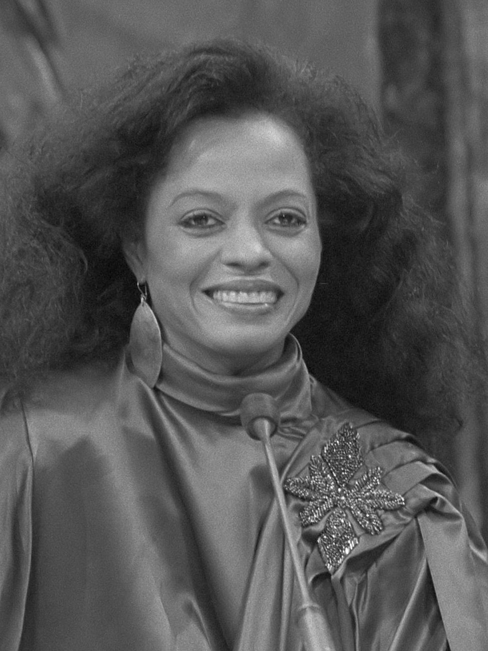 Televisieprogramma "Mies" van Mies Bouwman meest bekeken programma. Diana Ross in het programma "Mies" 18 november 1981